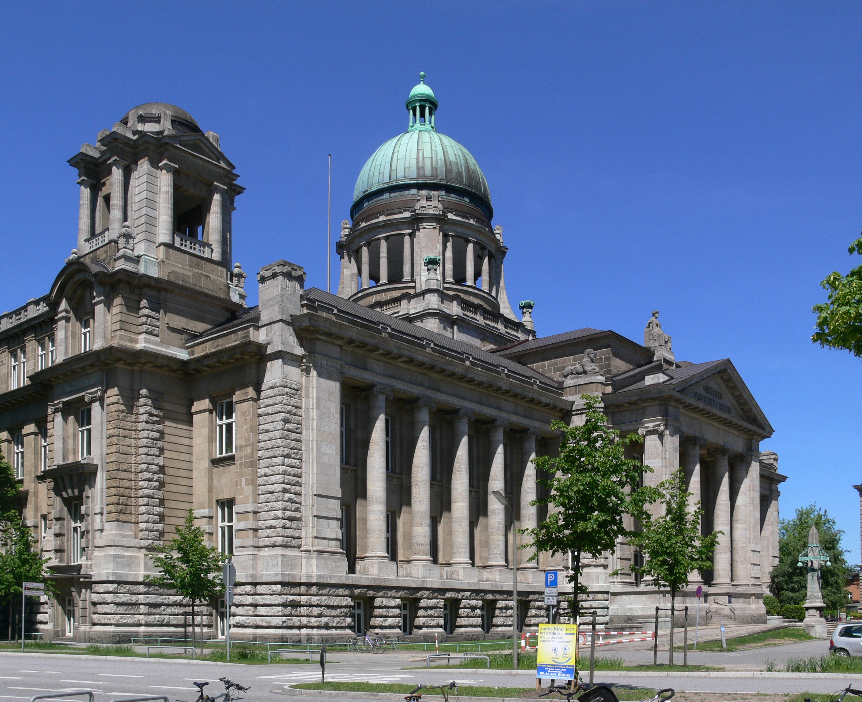 Hamburg, Hanseatisches Oberlandesgericht (Hamburg)